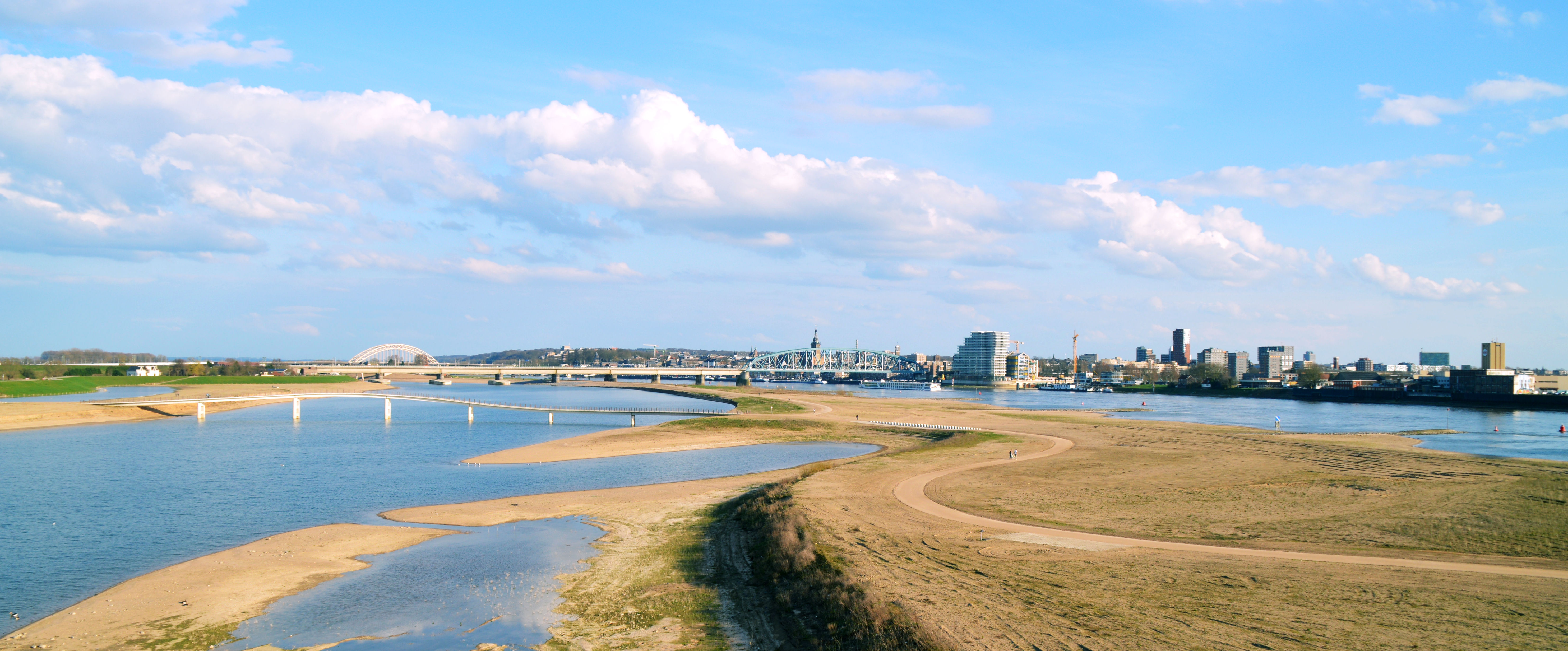 Nijmegen view